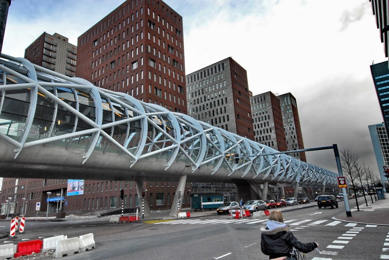 De Prinsenhof. Negen aan elkaar geschakelde torens langs de Prinses Beatrixlaan. Het complex bevat 60.000 m2 kantoorruimte, een horecaplein, 1.000 parkeerplaatsen, een viersterren-hotel, 2.000 m2 fitness, winkels, kinderopvang en 207 luxe huurappartementen. Het complex ligt rechts van de Utrechtsebaan (A12 Utrecht-Den Haag). Opgeleverd in 2006.